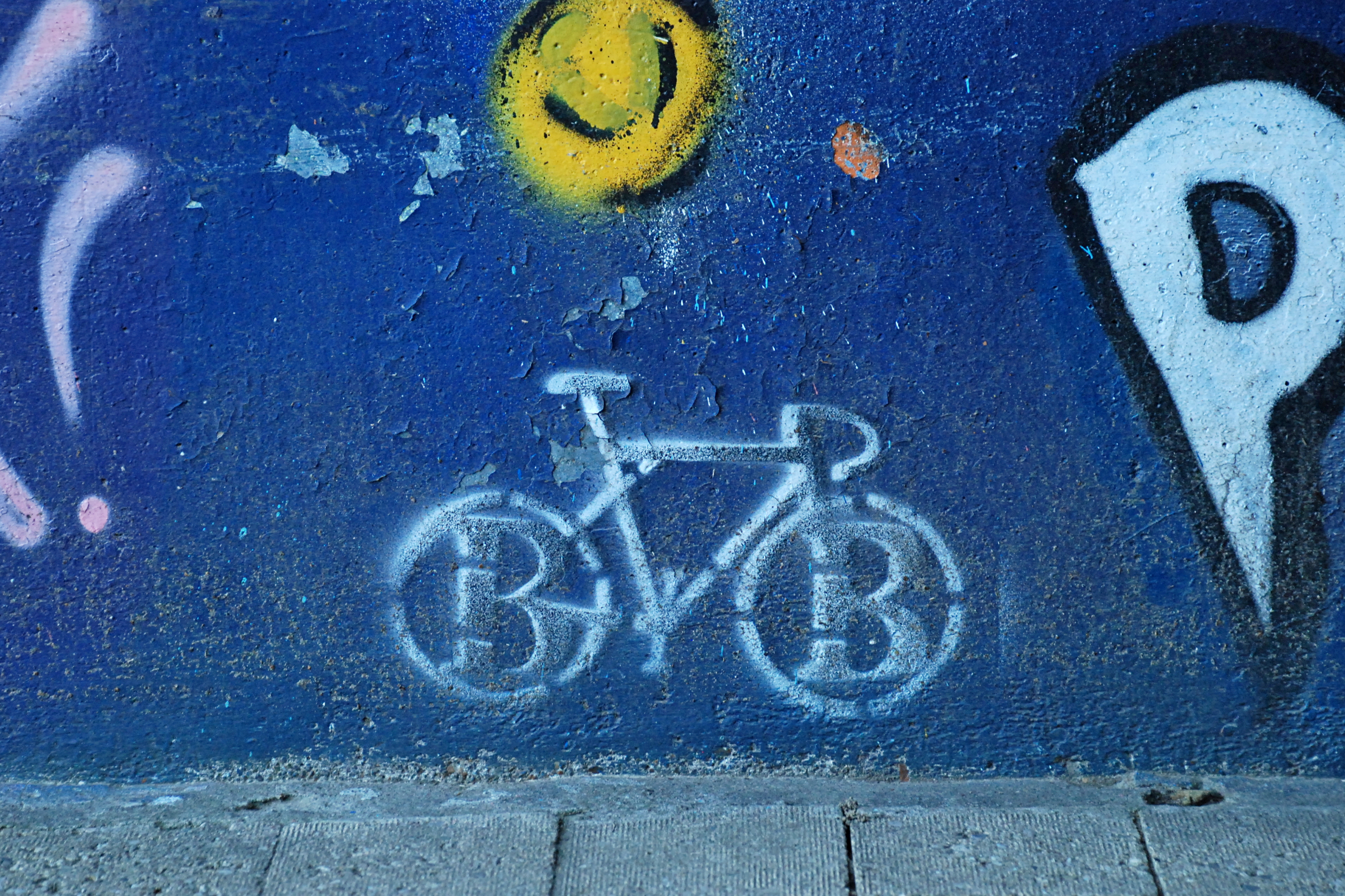 Belgique - Brabant wallon - Ottignies-Louvain-la-Neuve : tunnel décoré de graffitis aux abords du lac de Louvain-la-Neuve